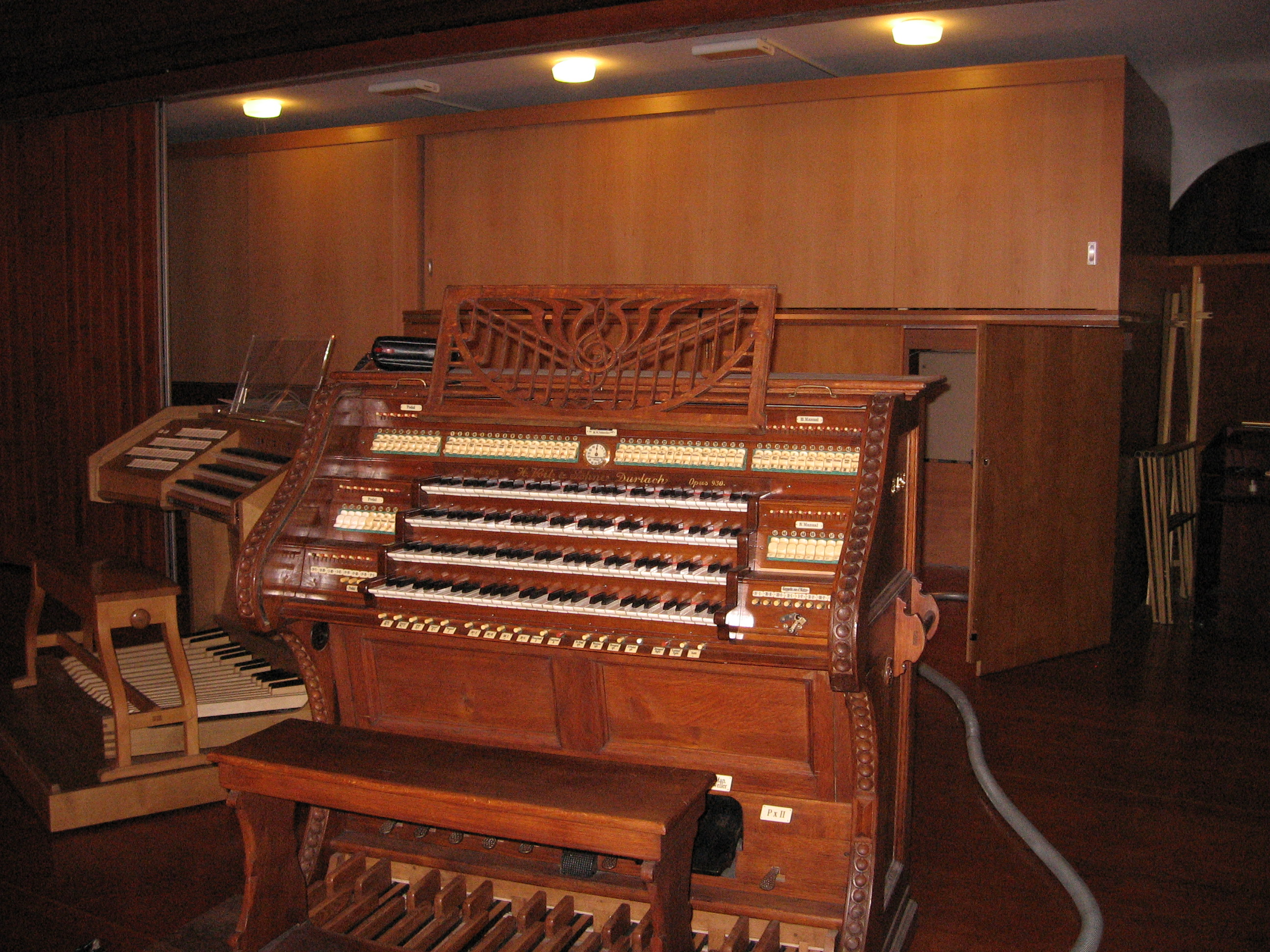 Spieltisch der Voitorgel, Stadthalle Heidelberg